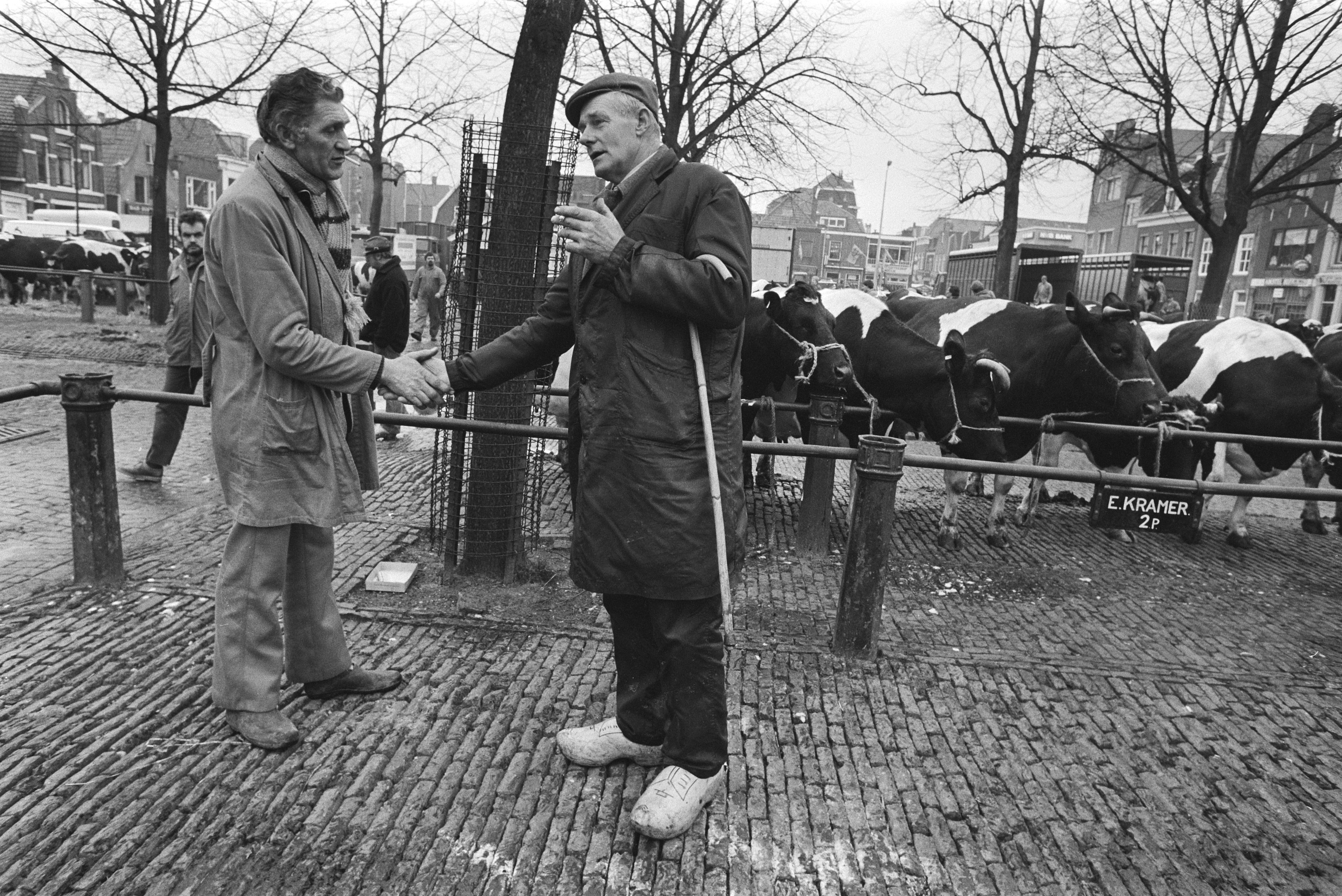 Collectie / Archief : Fotocollectie Anefo Reportage / Serie : [ onbekend ] Beschrijving : Veemarkt Purmerend (eerste keer weer na mond- en klauwzeer in Noord Holland ); overzicht, koeien Datum : 13 maart 1984 Locatie : Purmerend Trefwoorden : markten, vee Fotograaf : Bogaerts, Rob / Anefo Auteursrechthebbende : Nationaal Archief Materiaalsoort : Negatief (zwart/wit) Nummer archiefinventaris : bekijk toegang 2.24.01.05 Bestanddeelnummer : 932-8941